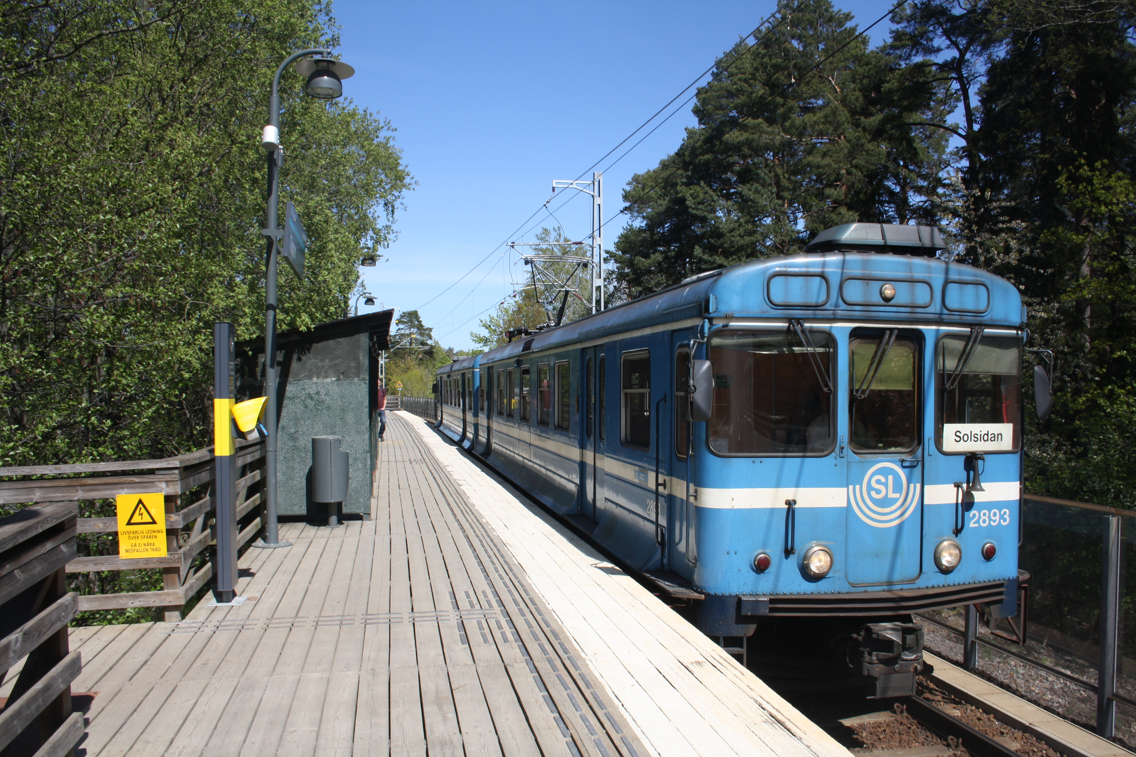 Tippen station